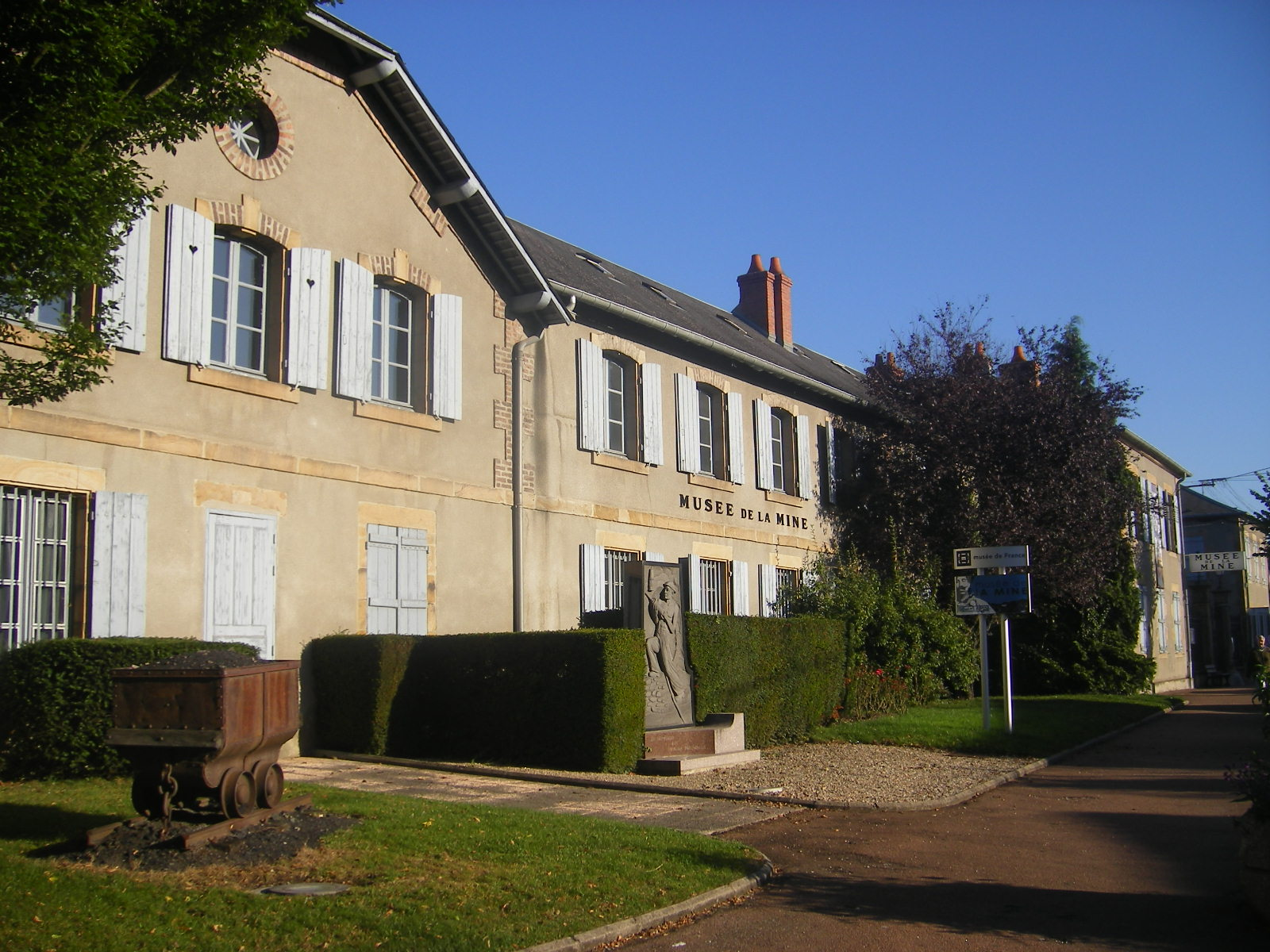 La Machine, Mine Museum